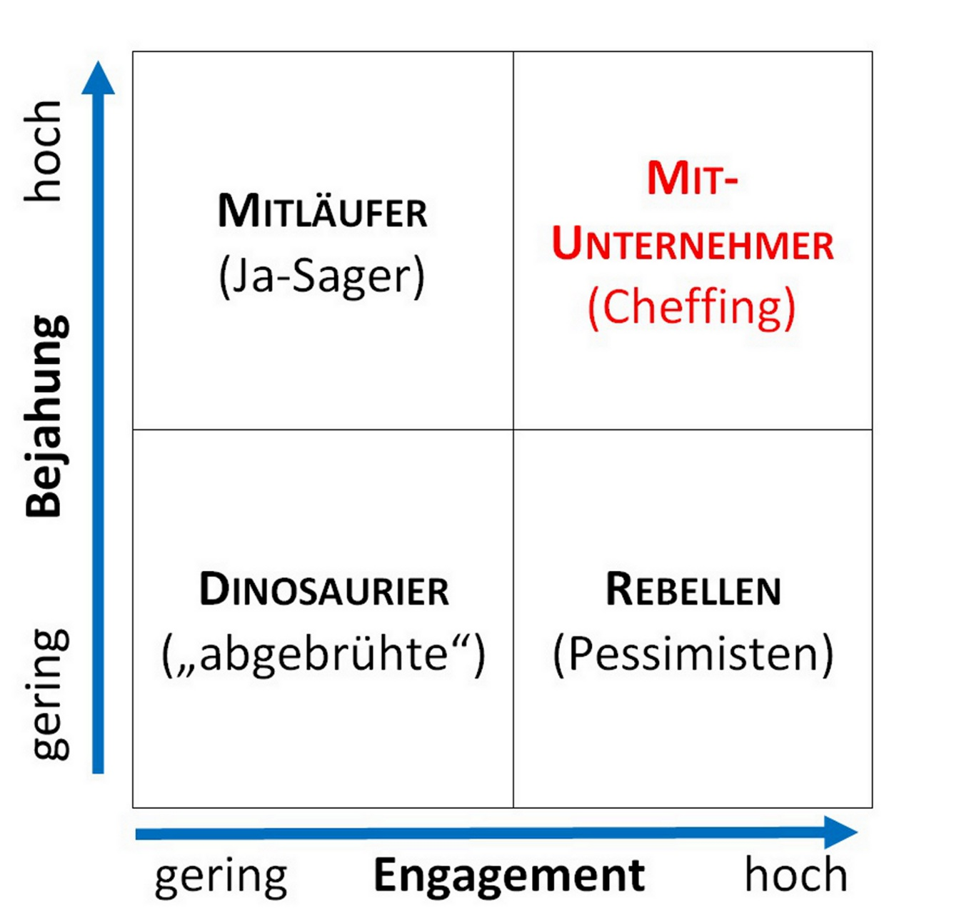 Change-Holder-Portfolio nach Herzlieb, Heinz-Jürgen / Friedrich, Ulrich: "Cheffing - Führen von unten", Cornelsen Verlag Scriptor GmbH & Co KG, Berlin 2005 (2. Auflage), S. 7